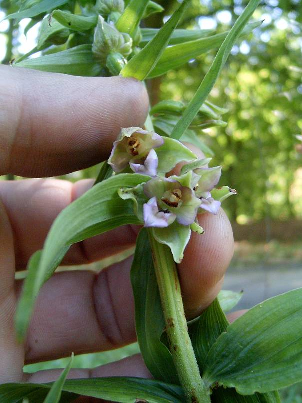 Česky: Brno Komín, kruštík polabský (Epipactis albensis), obzvláště silná rostlina, MŠ Řezáčova, samovolně vzrostlá rostlina zadupána a zničena rodiči dětí při oslavě na konci roku 2007. Rostlina je zapsaná do Červené knihy chráněných rostlin. Zdokumentována symbioza s mravenci. Druh potvrzen prof. Šmitákem.